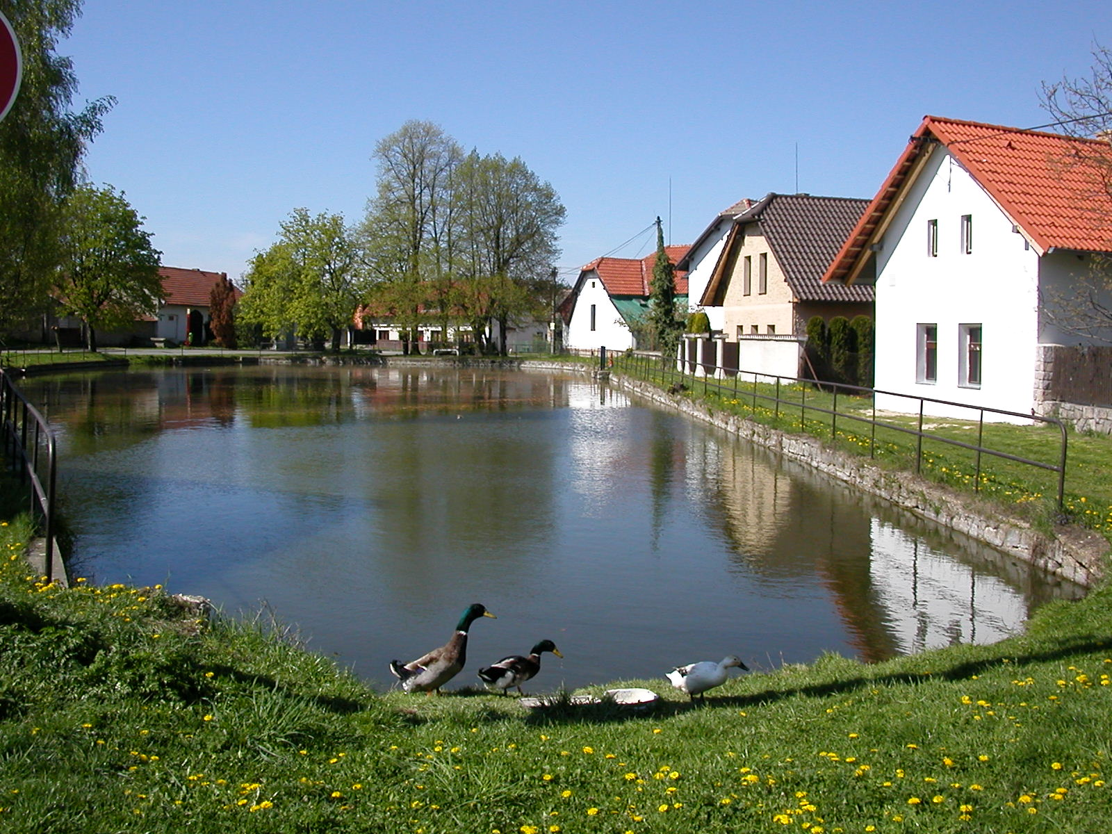 pohled na náves a rybník v Doubku